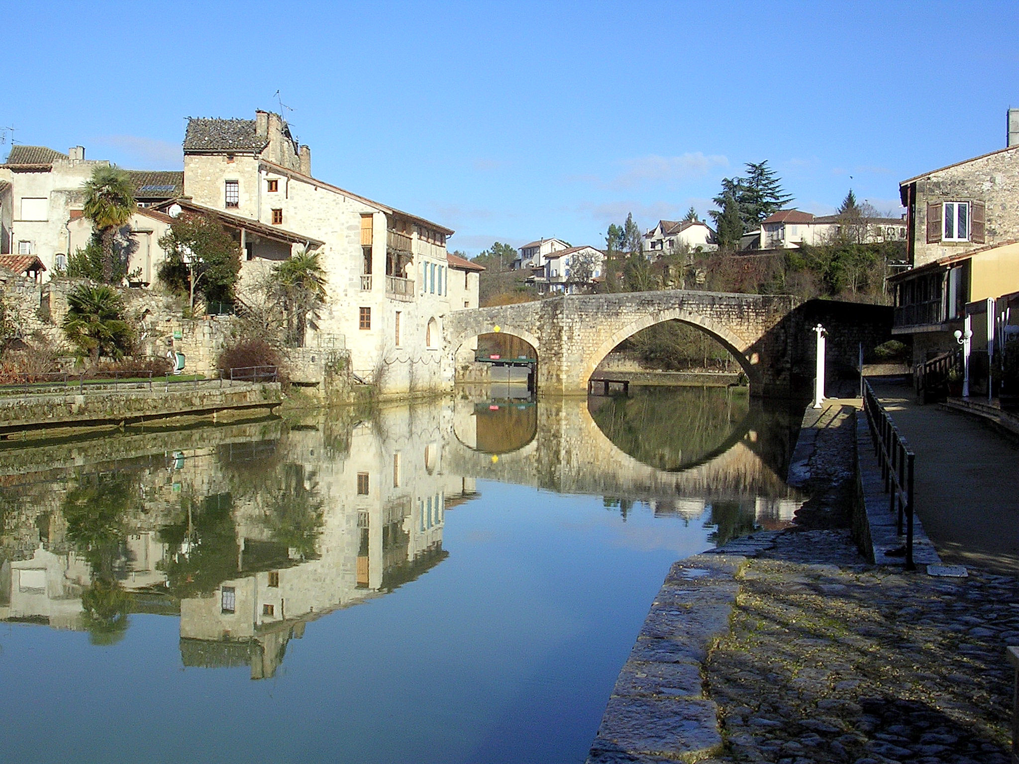 Le Petit Nérac, le pont vieux enjambant la Baïse (Lot-et-Garonne, France)